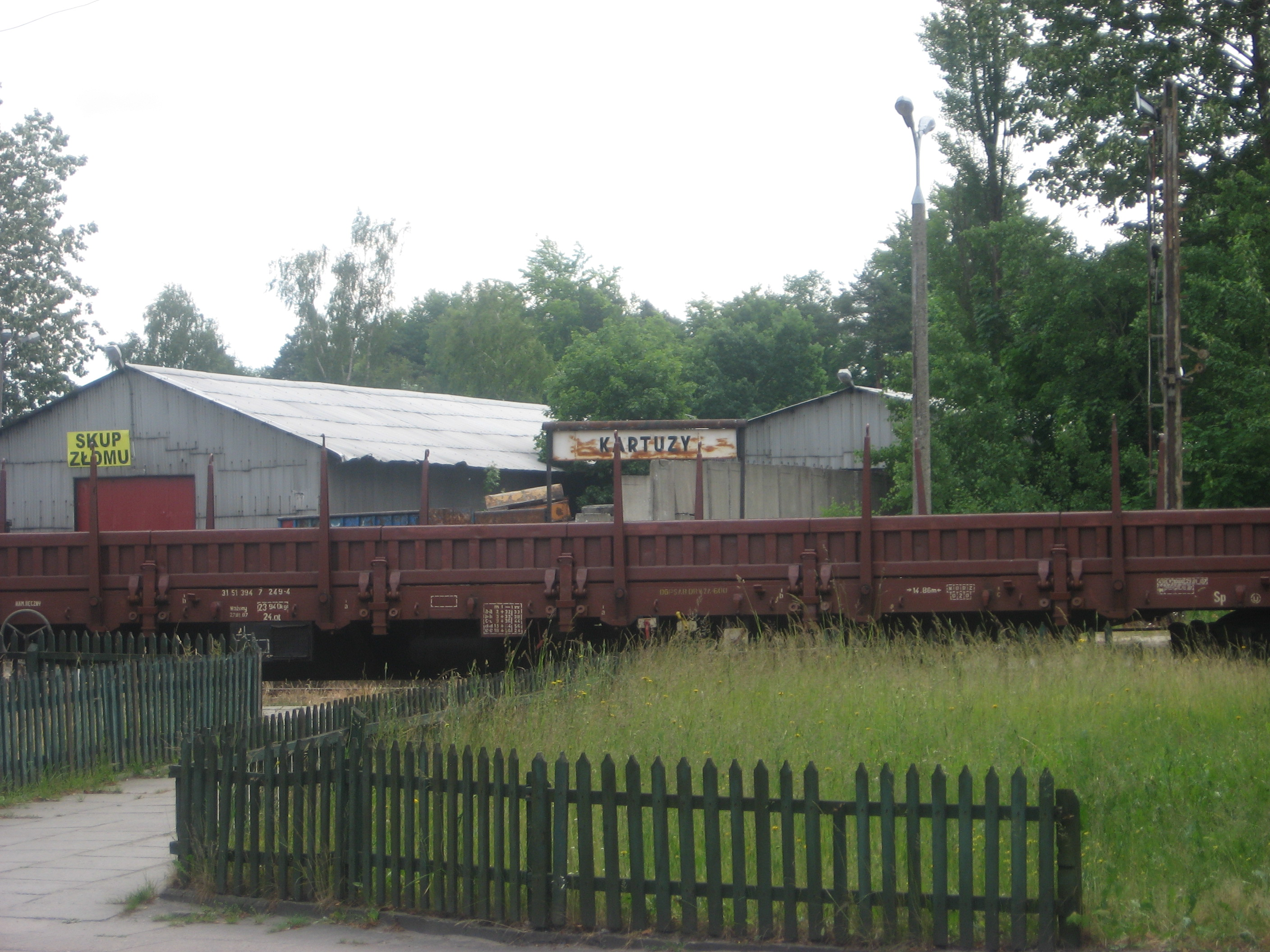 Stacja kolejowa Kartuzy (woj. pomorskie)